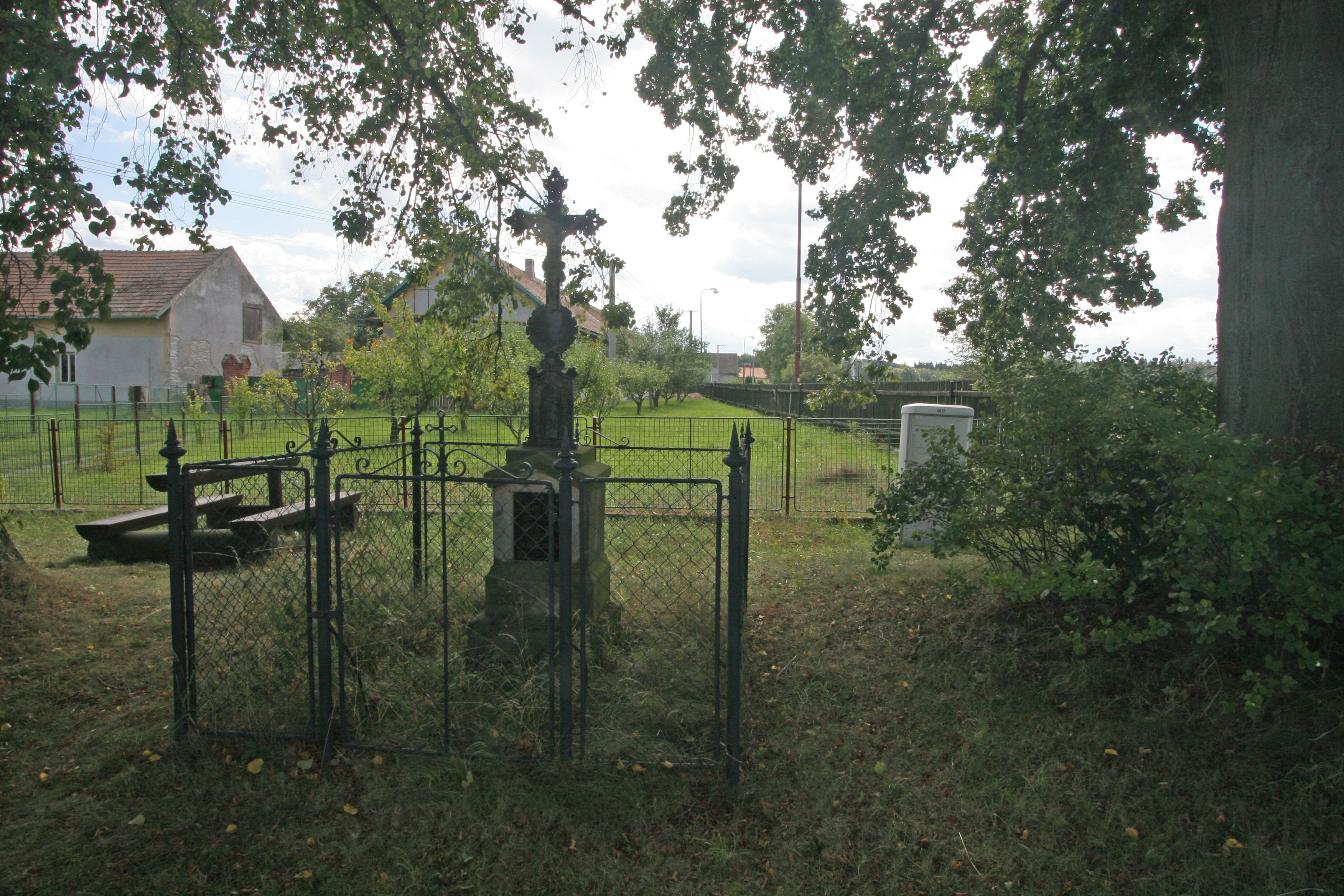 Březinka kříž